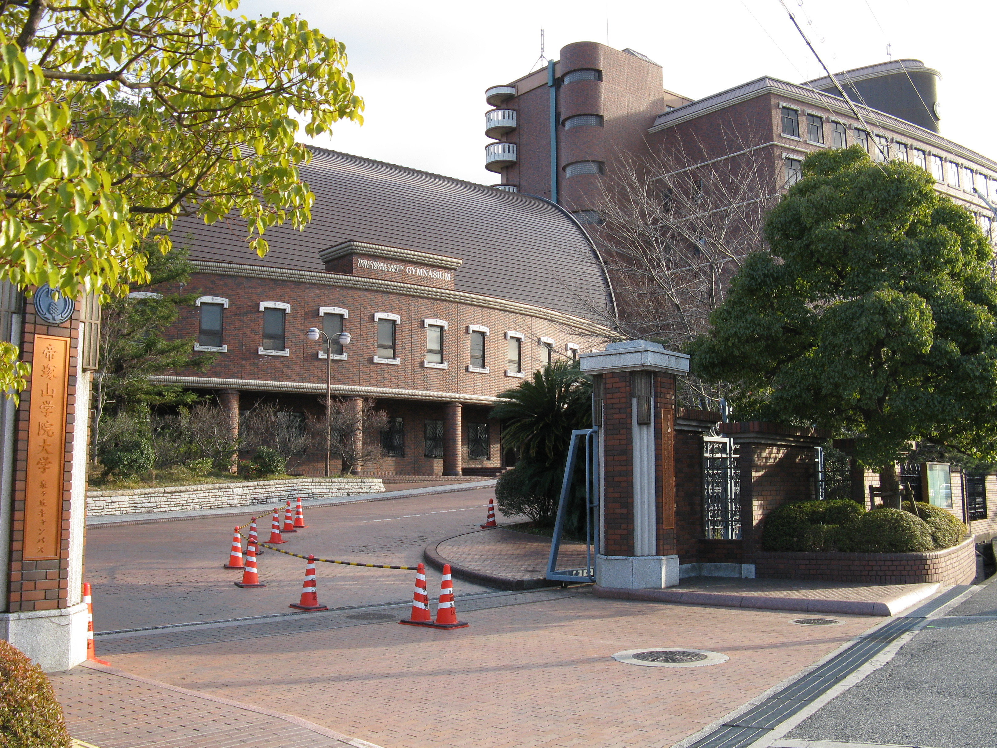 帝塚山学院大学 泉ヶ丘キャンバス